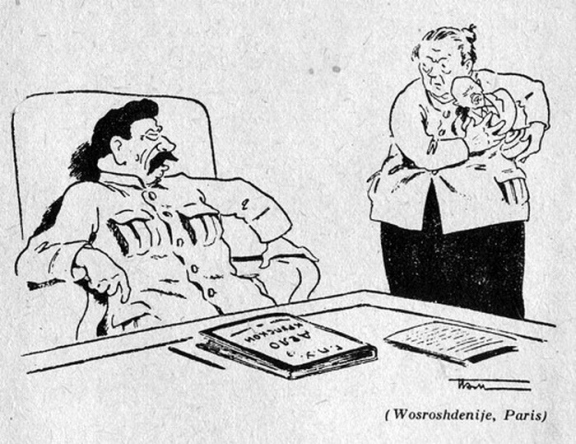 "Если ты не перестанешь иметь дело с троцкистами, я назначу Ленину другую вдову". Карикатура на И. В. Сталина и вдову Ленина Н. К. Крупскую в парижской белоэмигрантской газете "Возрождение"